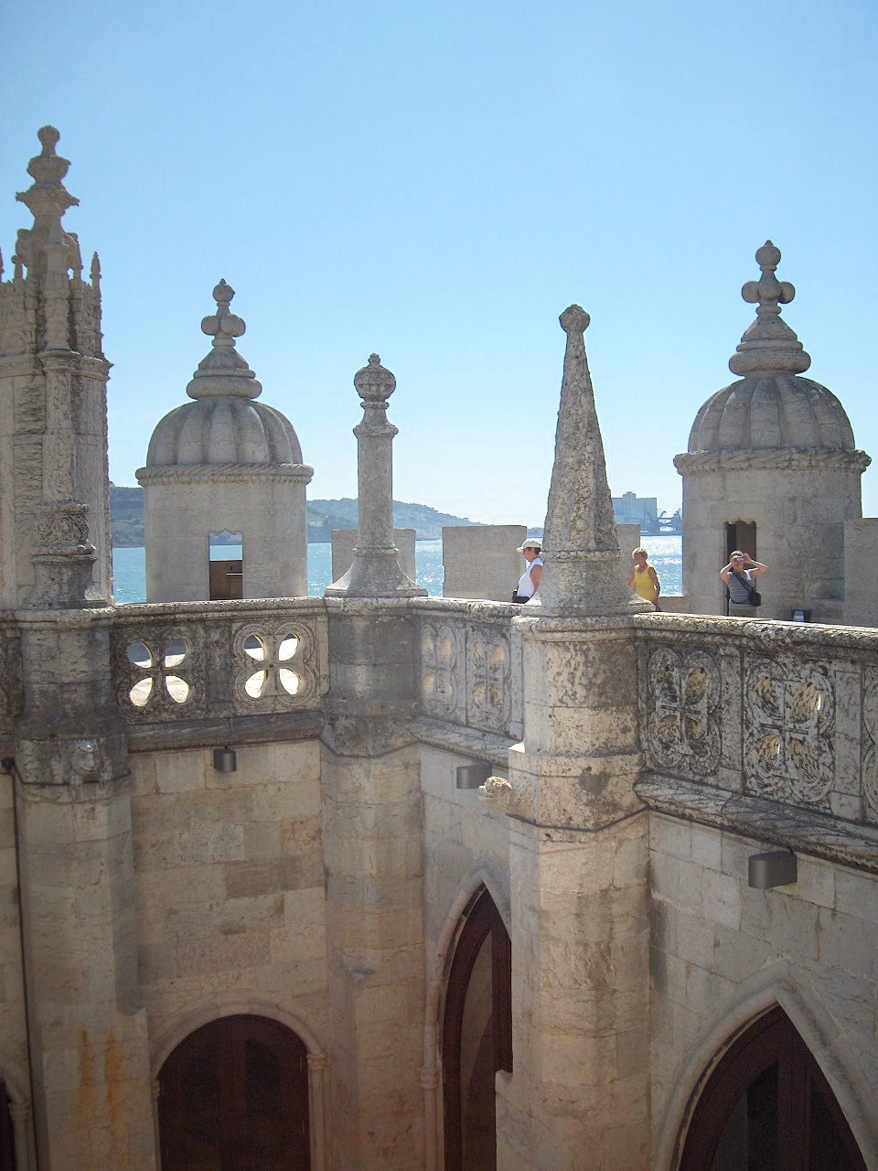 Torre de Belém ,Belém (Lisbon), Portugal